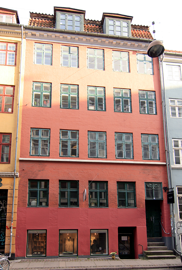 Møntergade 6, København. Bygget 1730. Fredet.